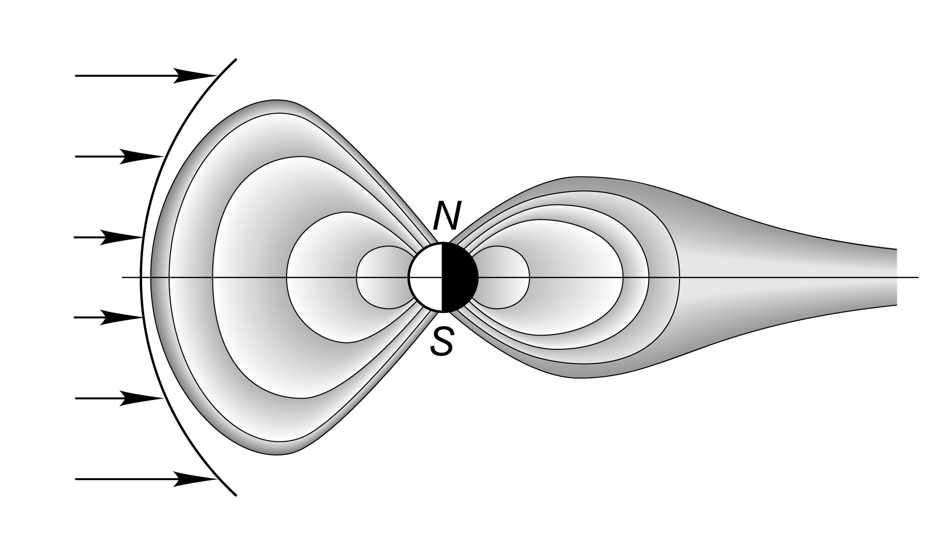 Солнечный Ветер и магнитное поле земли